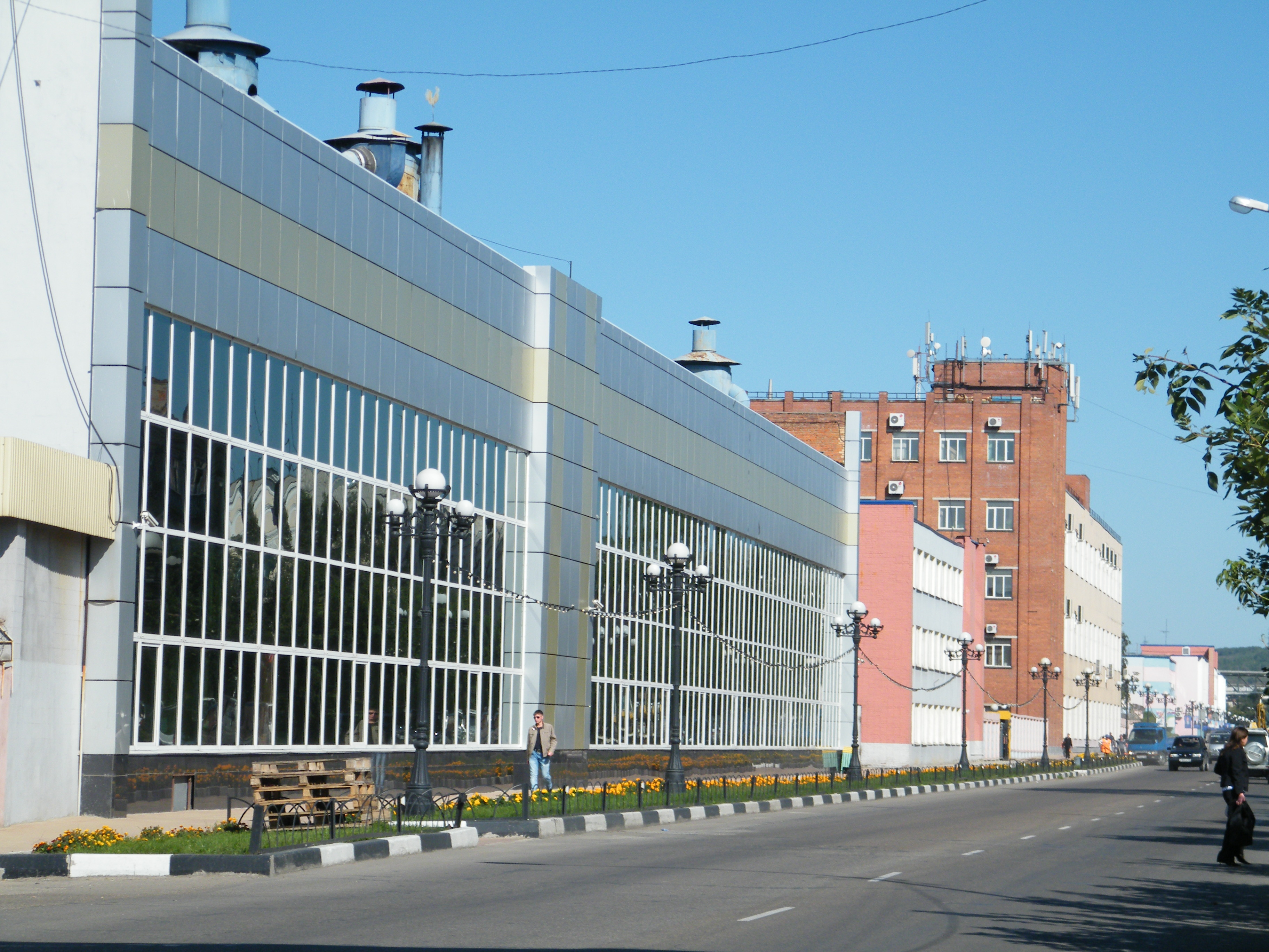 Уссурийский ЛРЗ